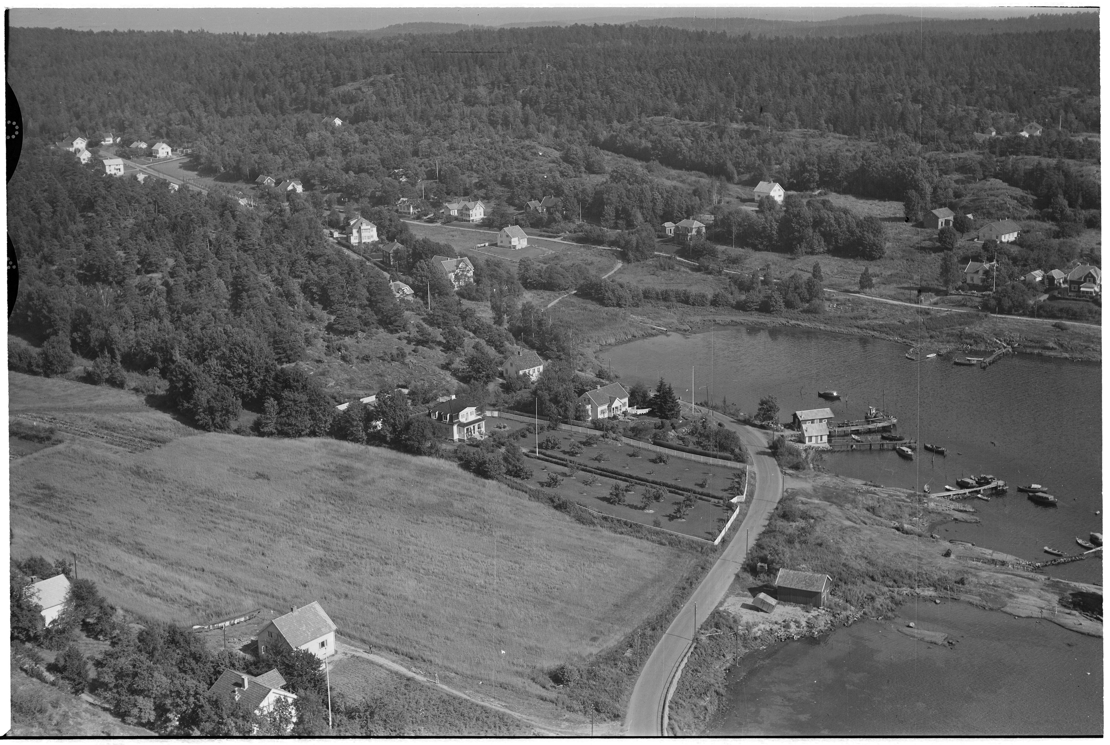 WF.S.77661 Kjøpmannskjær båtforening?